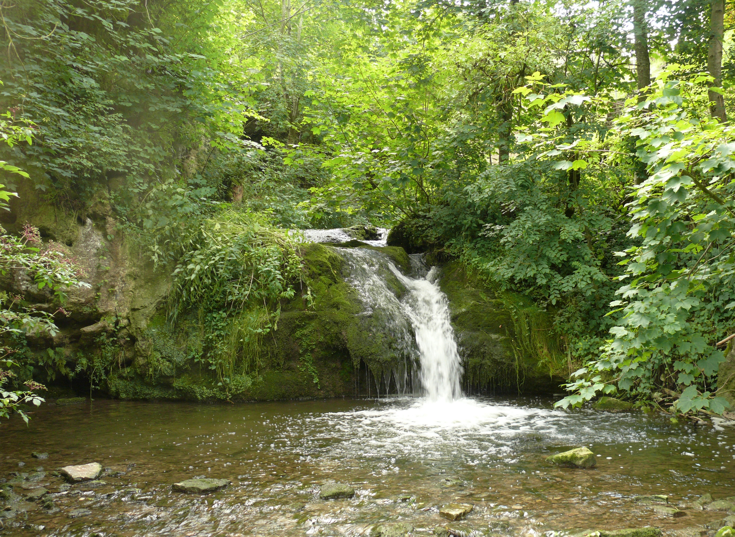 Wasserfall, über den der Schwarzenlachenbach zwischen Sulzdorf-Anhausen und dem zugehörigen Kirchplatz von Westen in die Bühler mündet.